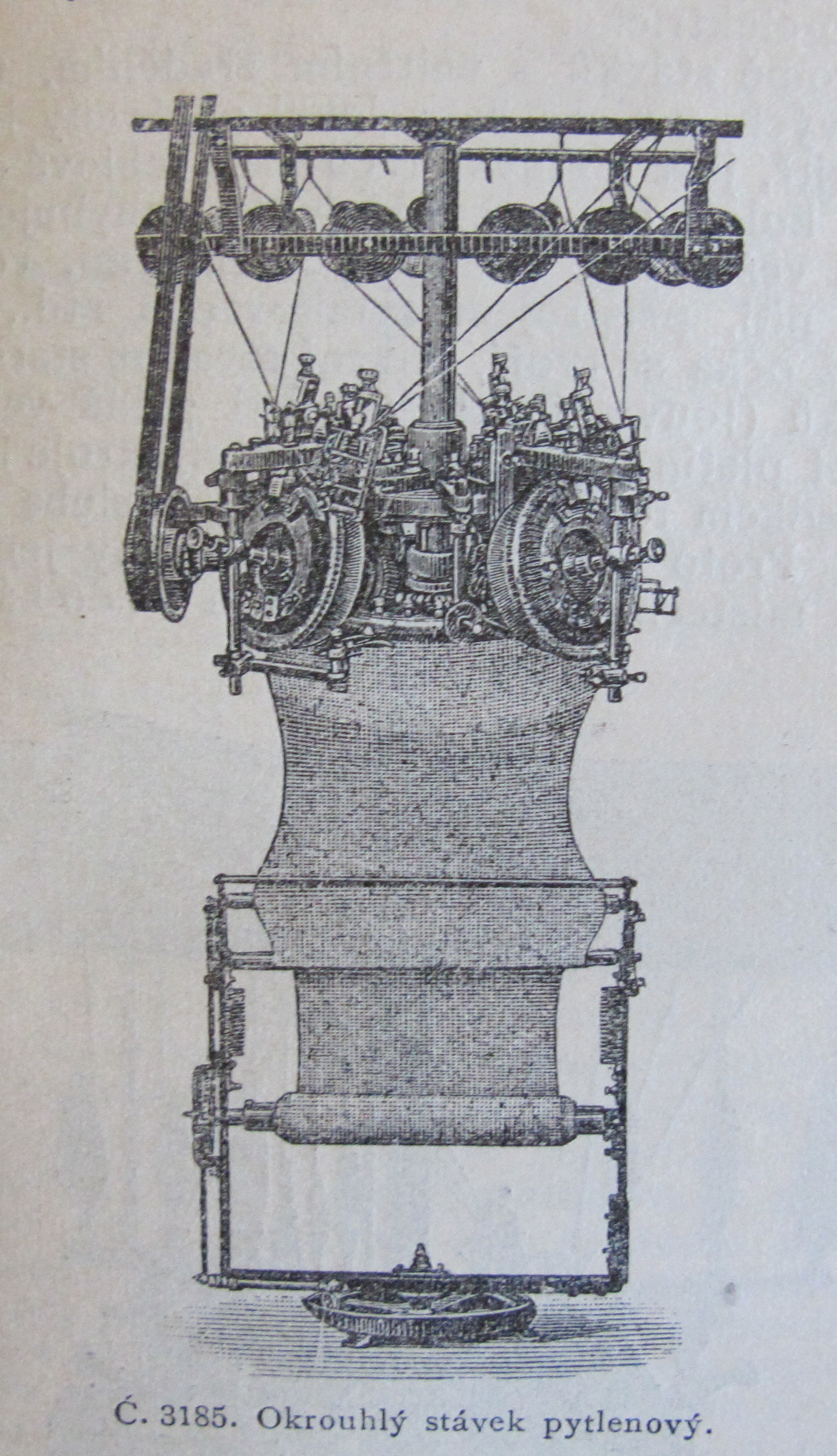 Původní popisek: Č. 3185. Okrouhlý stávek pytlenový.